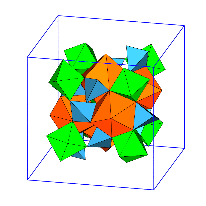 Granatstruktur: Verknüpdunge der Koordinationspolyeder basierend auf Strukturdaten von synthetischen Grossular bei Raumtemperatur